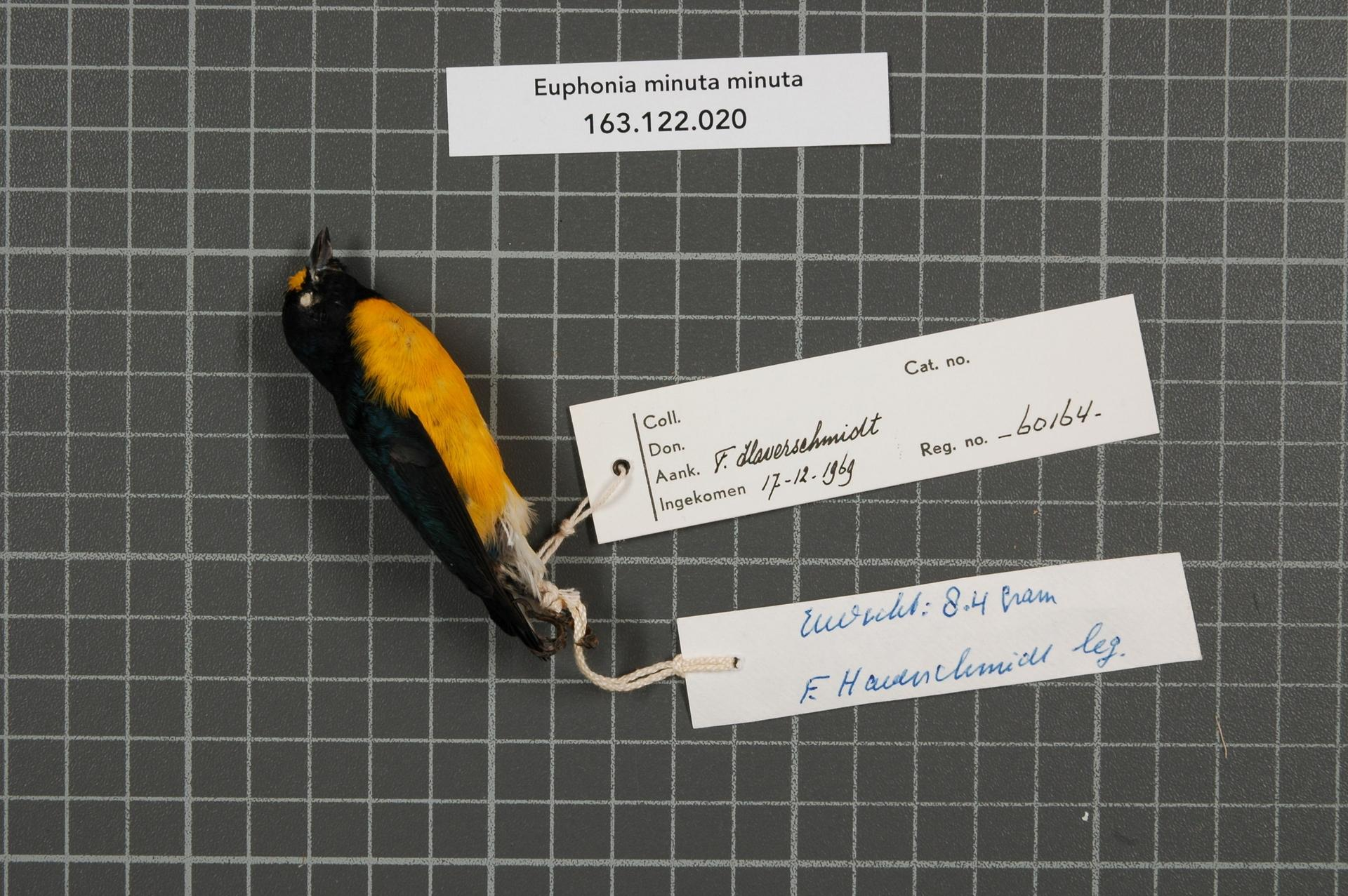 Euphonia minuta humilis (Cabanis, 1860)